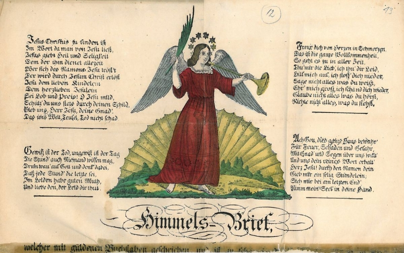 "Himmelsbrief" mit Darstellung eines Engels (koloriert) und mit christlichen Texten, von ca. 1800 - 1850. Stadtarchiv Heilbronn, Signatur: E002-19